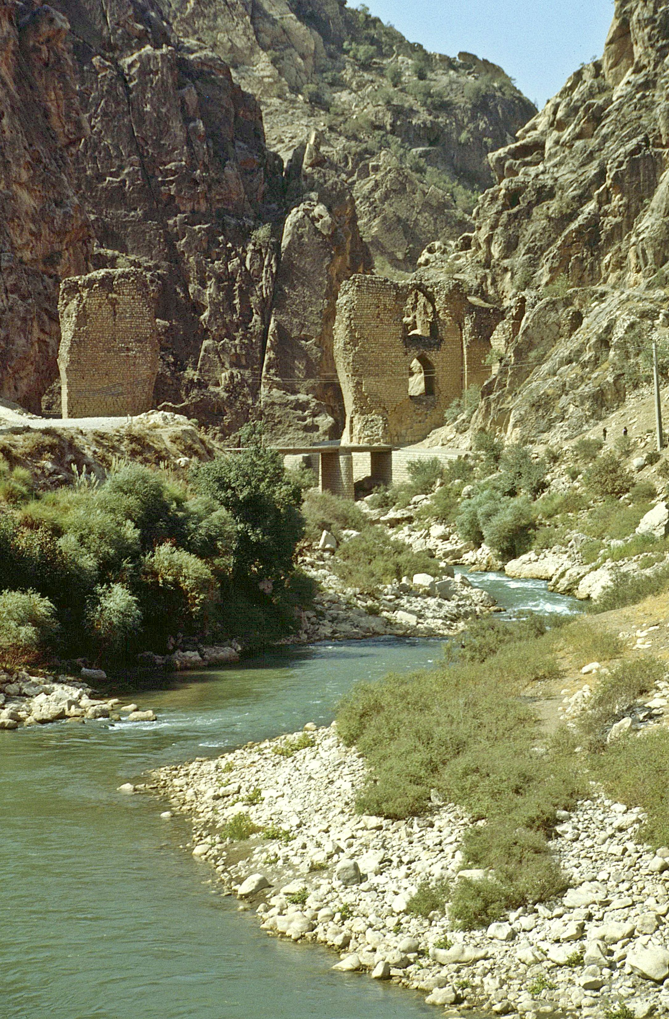 Sassanidische Brückenruine in Luristan